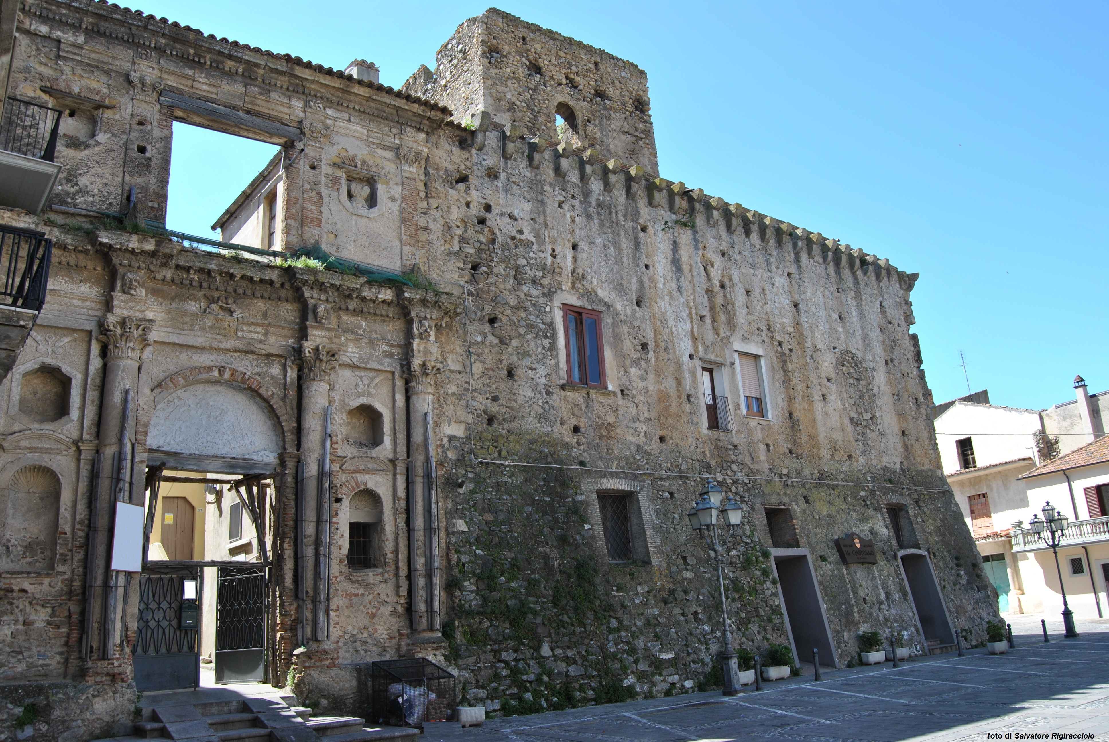 il Castello Feudale di Terranova da Sibari. Foto scattata da Salvatore Rigiracciolo in data 28/04/2012